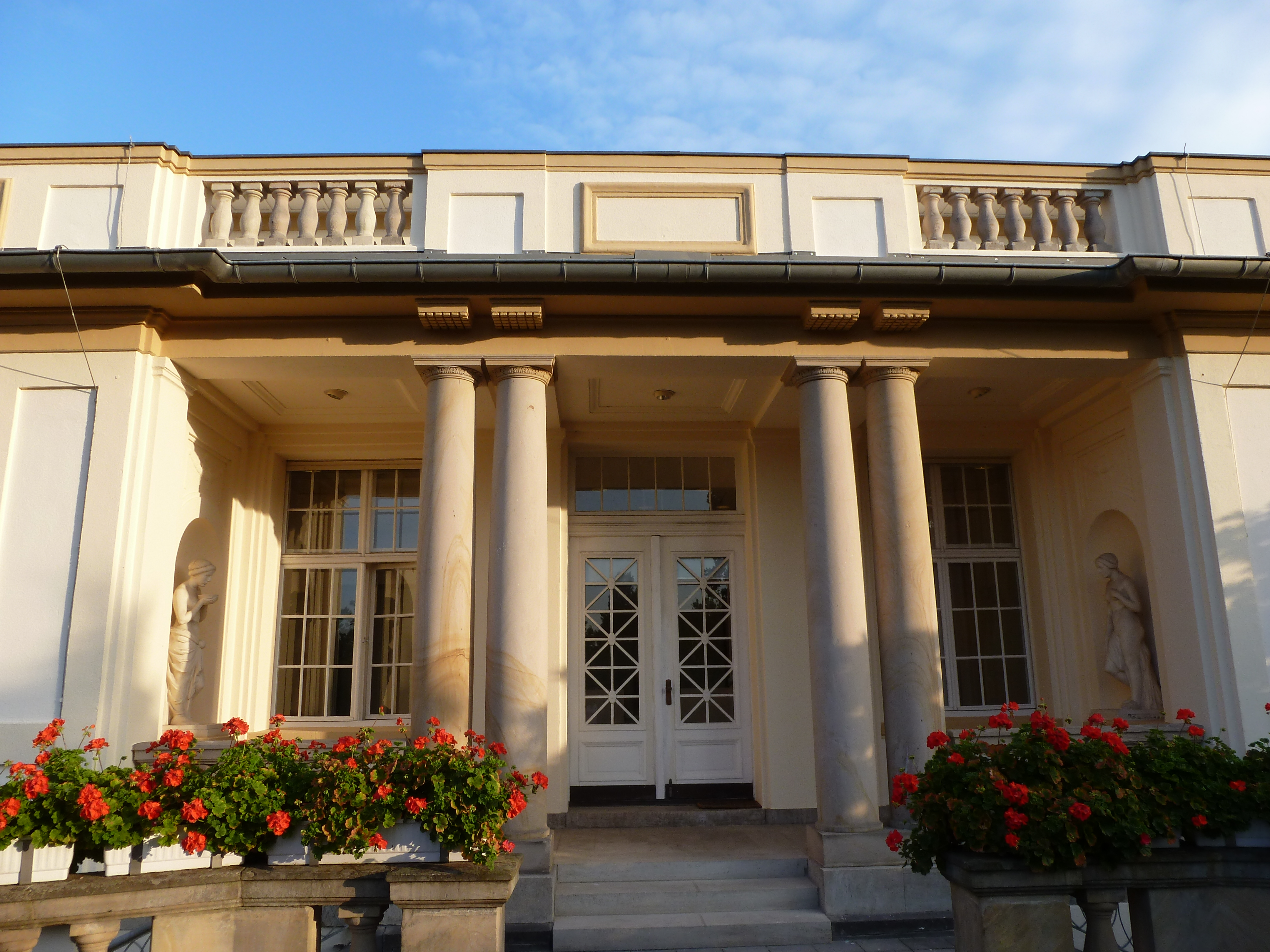 Nahaufnahme des Medico Palais im 1. Stock